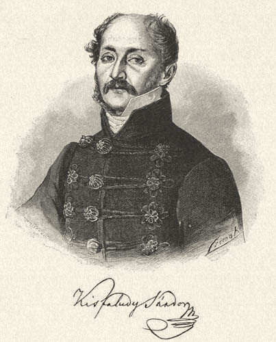 Kisfaludy Sándor (1772–1844) költő. Morelli Gusztáv fametszete. Megjelent Az Osztrák-Magyar Monarchia írásban és képben (1887–1901) kiadványban